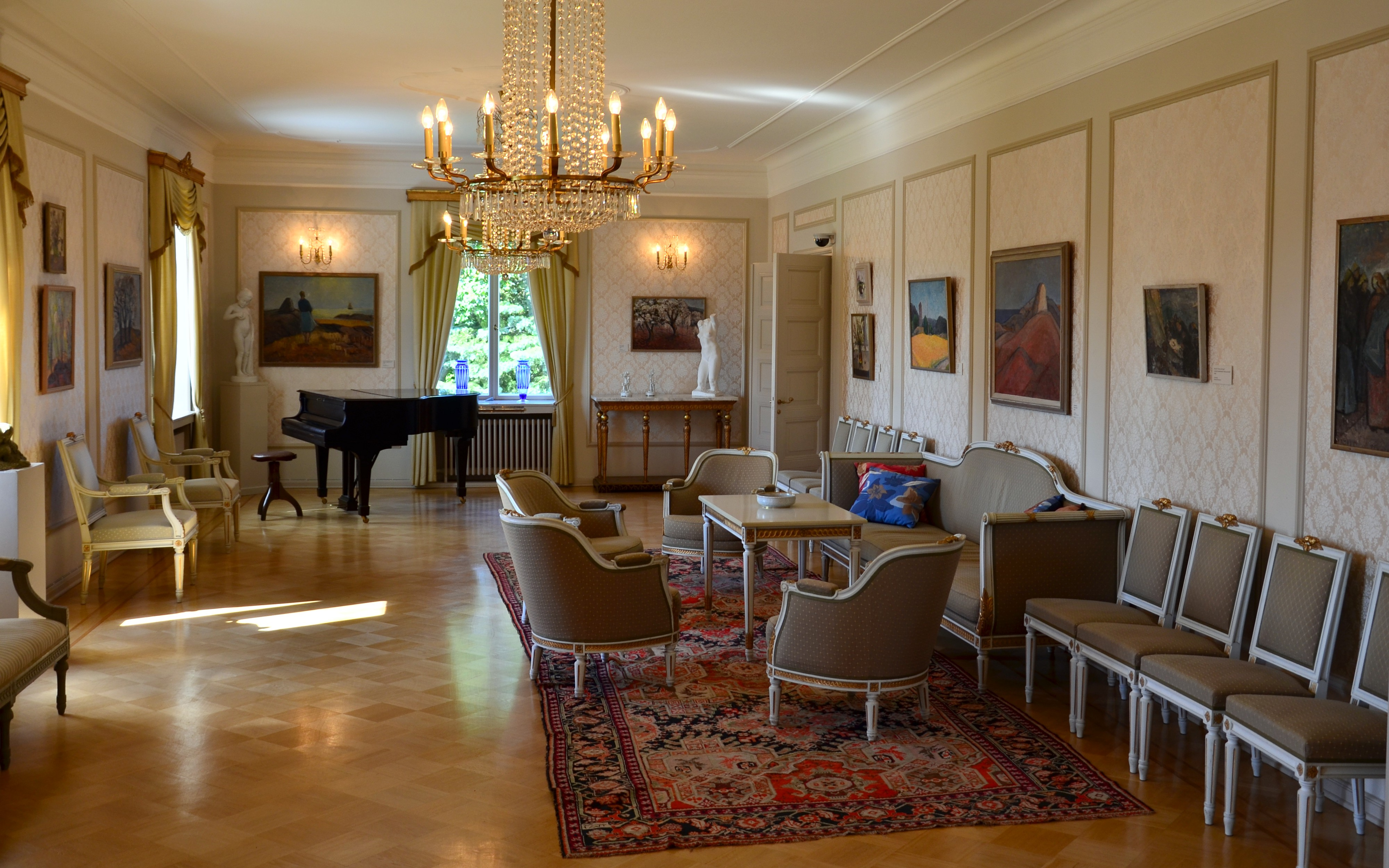 Salongen, Söderlångvik, Finland. Söderlångvik manor Native nameSöderlångviks museumParent institutionAmos Anderson Art MuseumLocationKimito island, FinlandCoordinates60° 02′ 00″ N, 22° 26′ 00″ E Established1961Web page control : Q6581530 institution QS:P195,Q6581530